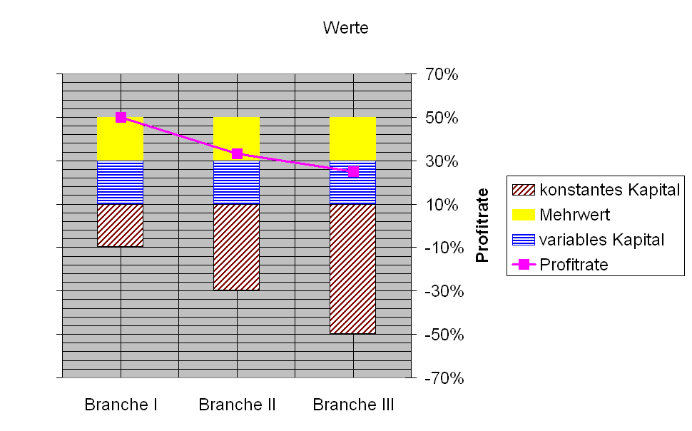 Schema I zur Verständlichmachung der Produktionspreise